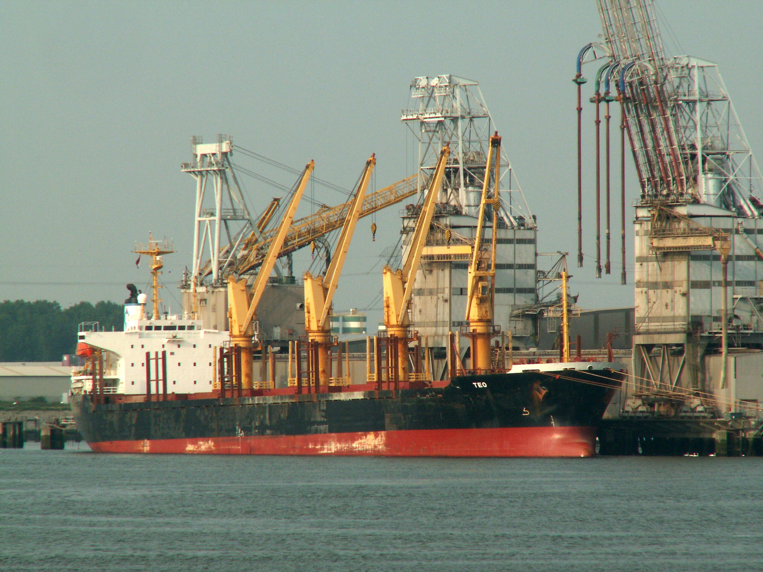 Teo IMO 8919104